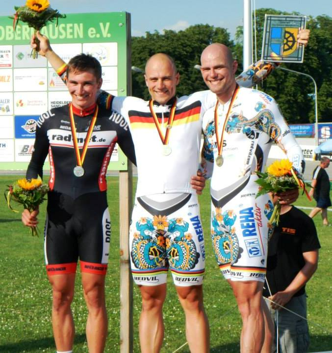 Siegerehrung Deutsche Bahnmeisterschaften 2013 in Oberhausen, 1000-Meter-Zeitfahren, v.l.n.r. Lucas Liß (2.), Maximilian Levy (1.), Sascha Hübner (3.)